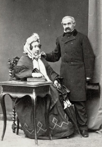 Лесовские Степан Степанович и София Александровна, урожденная Филатьева.